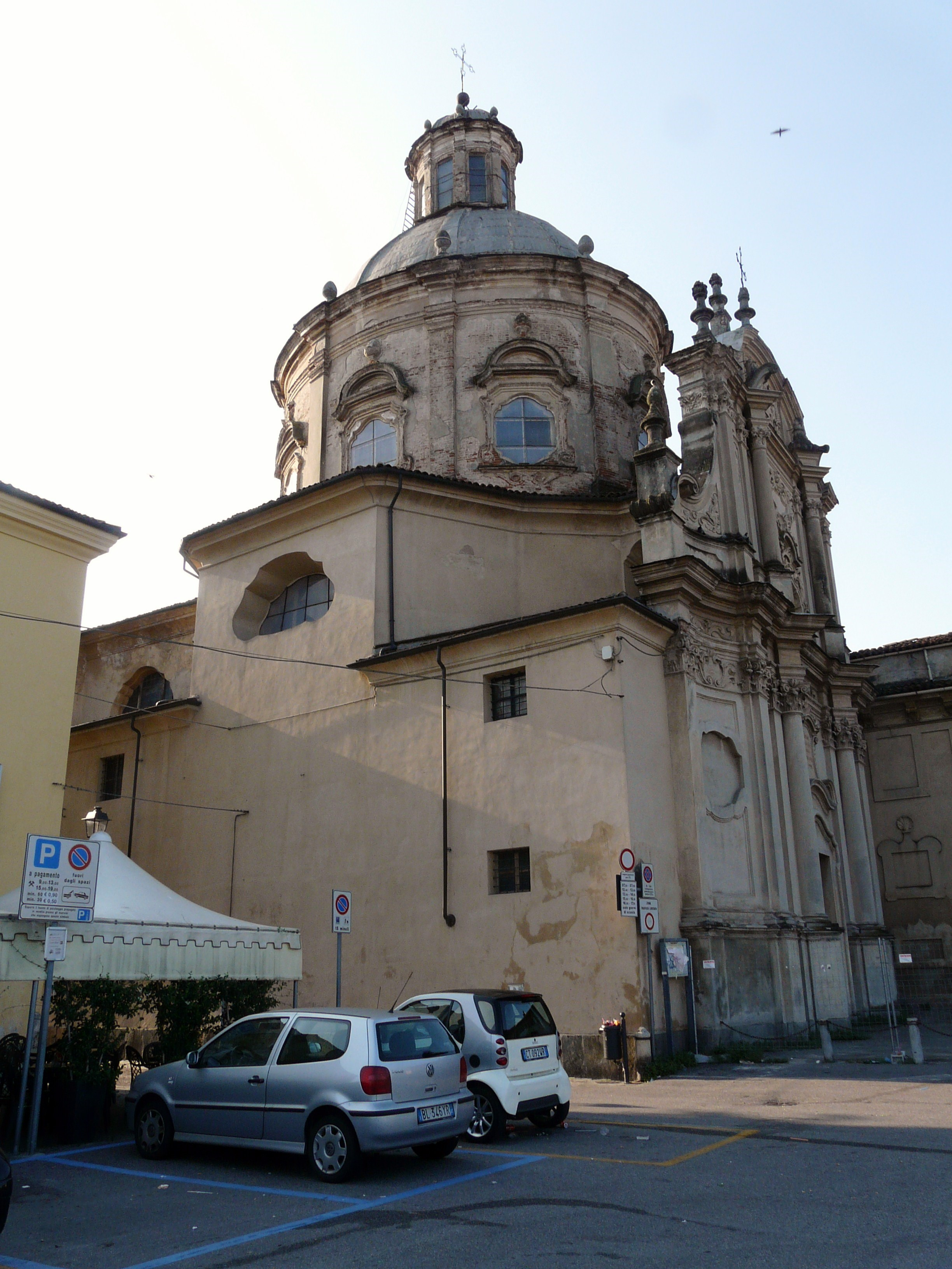 Chiesa di Santa Caterina, Casale Monferrato, Piemonte, Italia